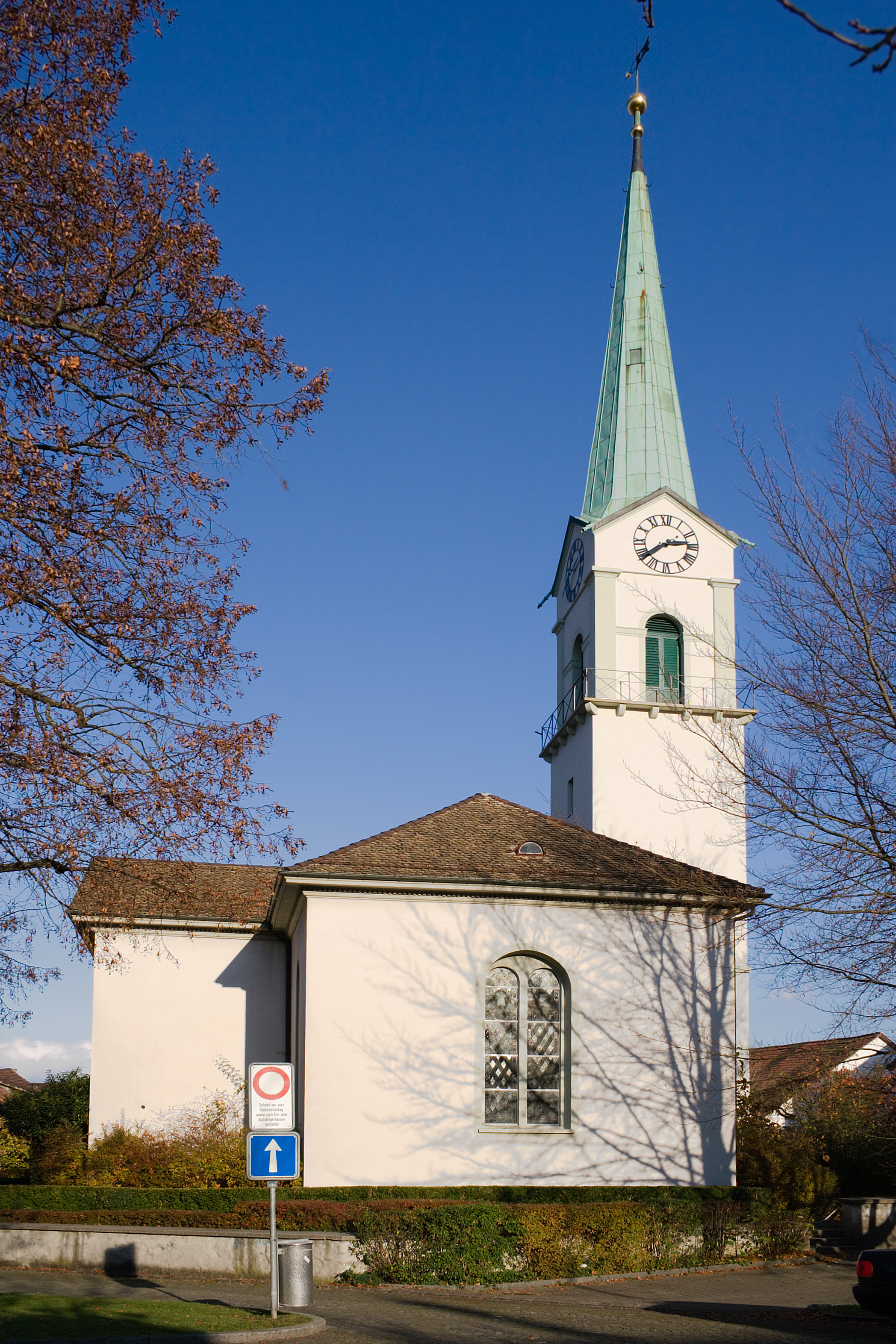 Die alte Kirche in Albisrieden, Stadt Zürich, SchweizErbaut von 1816–1818 durch Hans Conrad Stadler